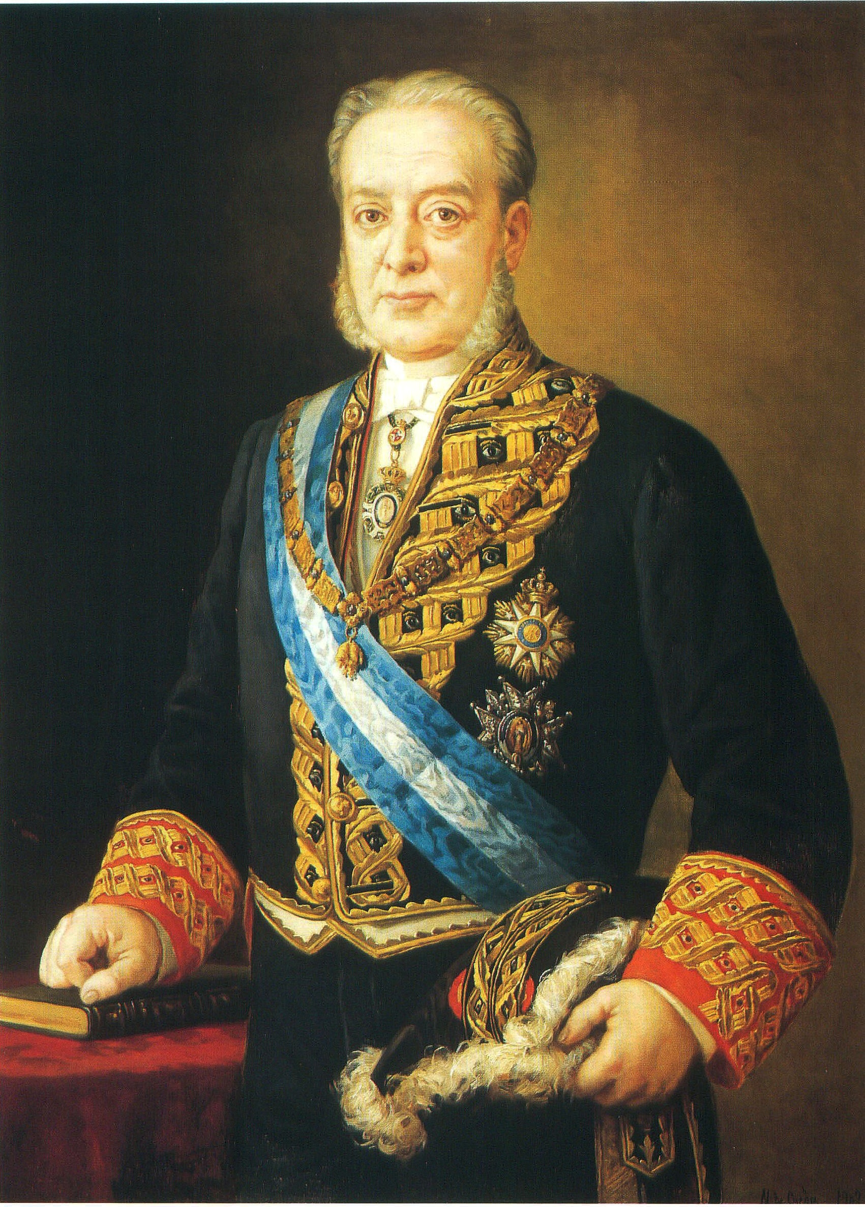 Retrato del aristócrata y politico español Manuel Aguirre de Tejada (1827-1911), conde de Tejada de Valdeosera y también ministro de Ultramar durante el reinado de Alfonso XII y ministro de Gracia y Justicia durante la regencia de María Cristina de Habsburgo-Lorena.